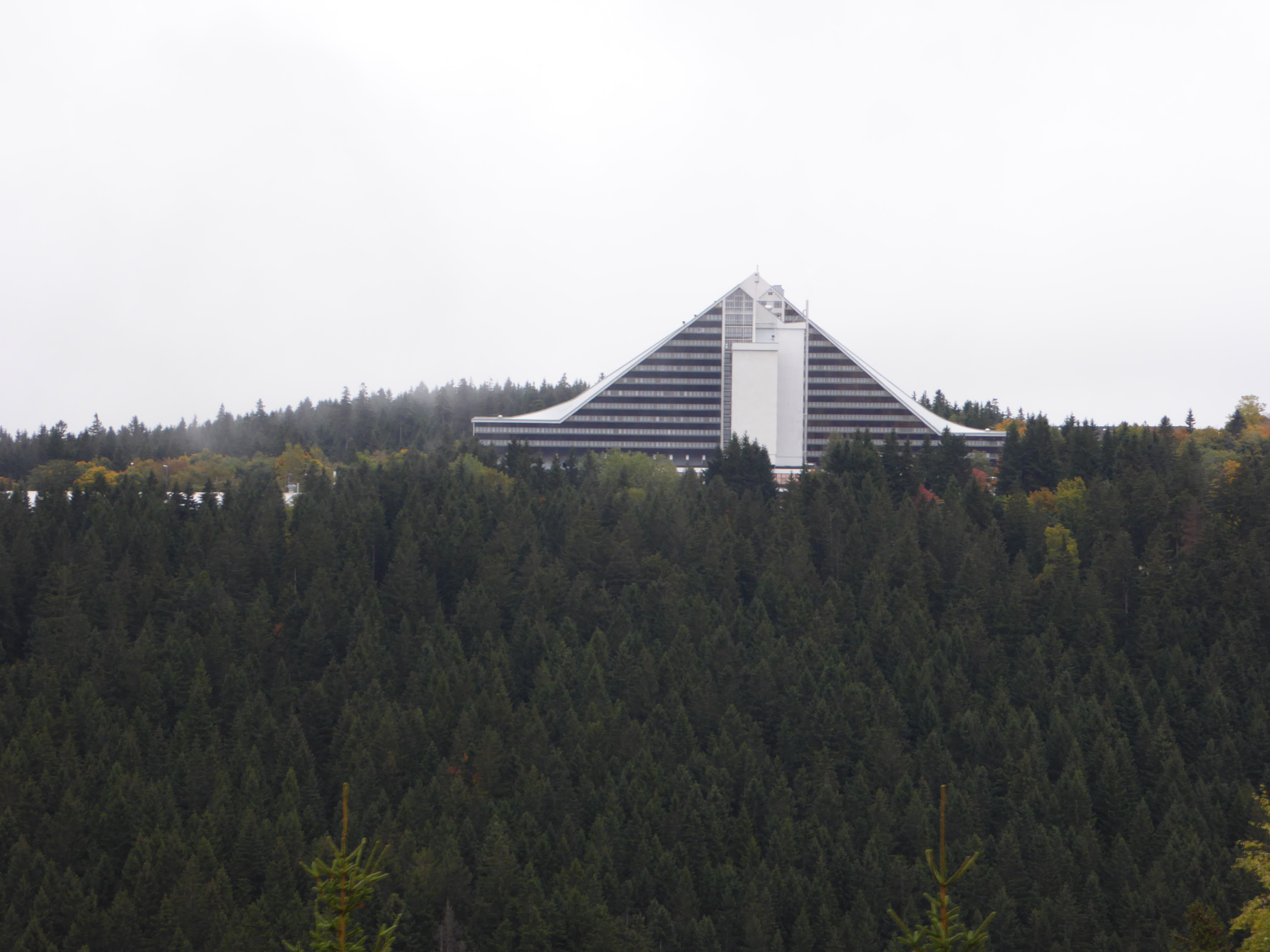 Oberhof Stadt am Rennsteig und Umgebung